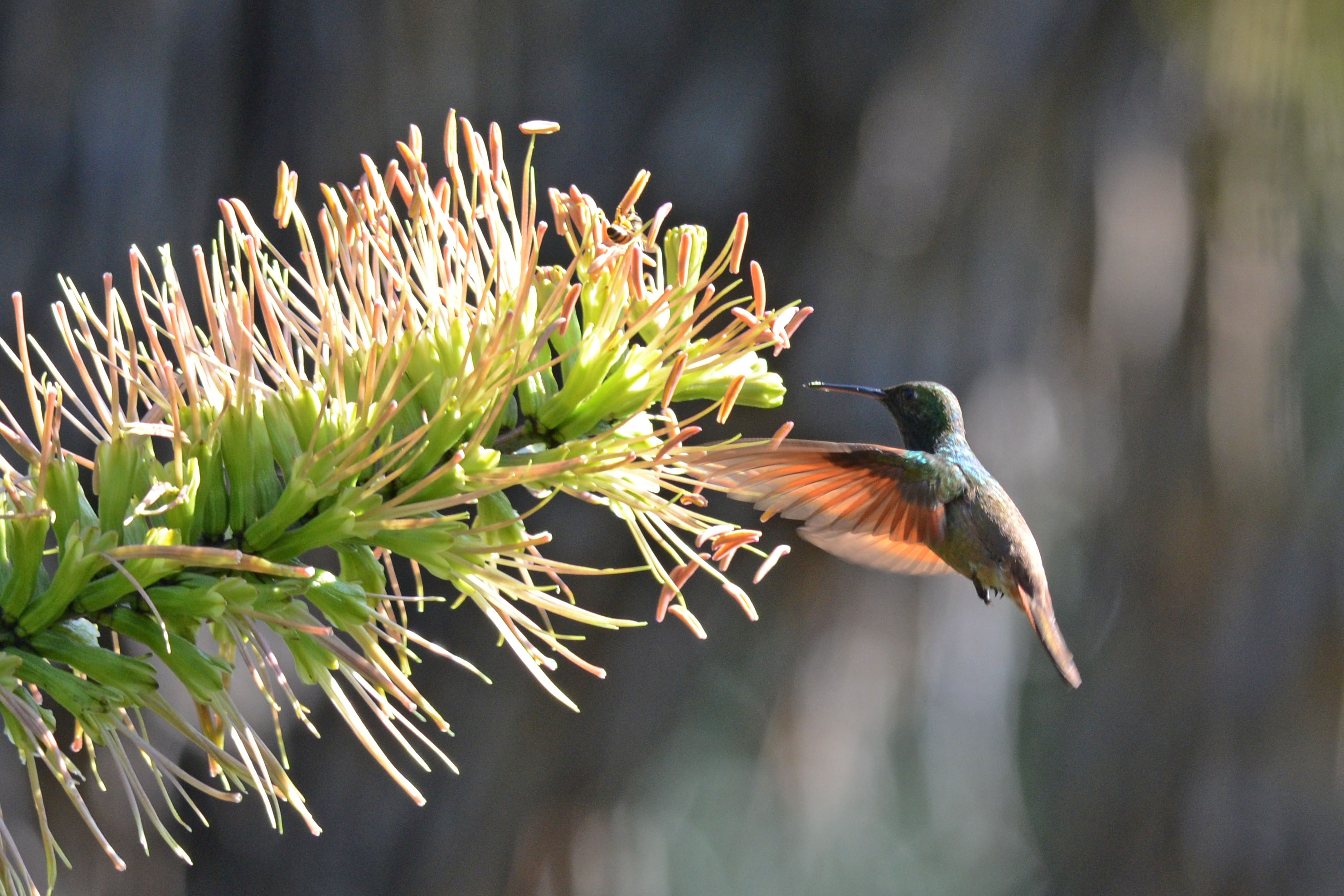 Jardín Botánico UNAM, México, D.F.